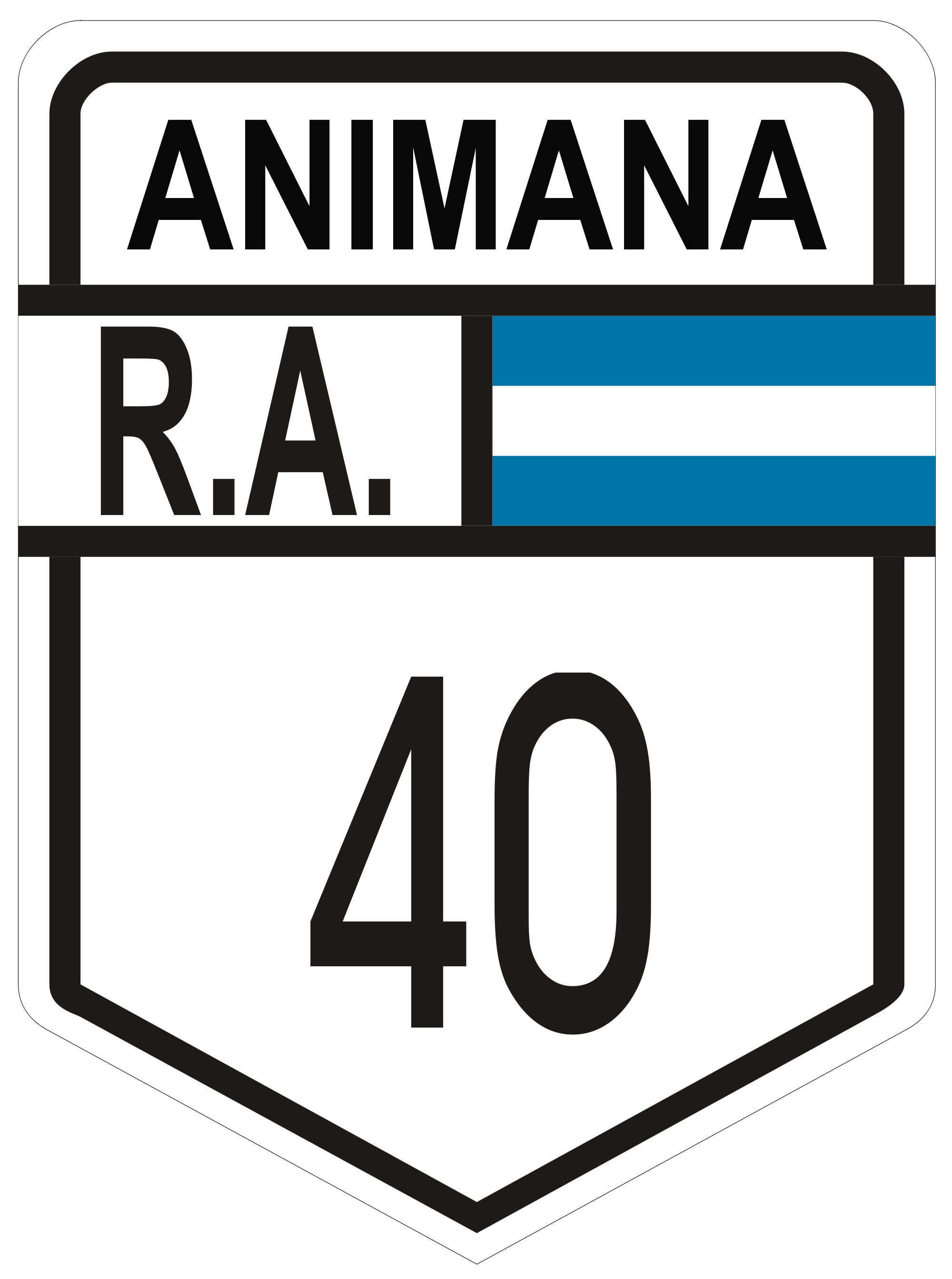 Animaná - RN40